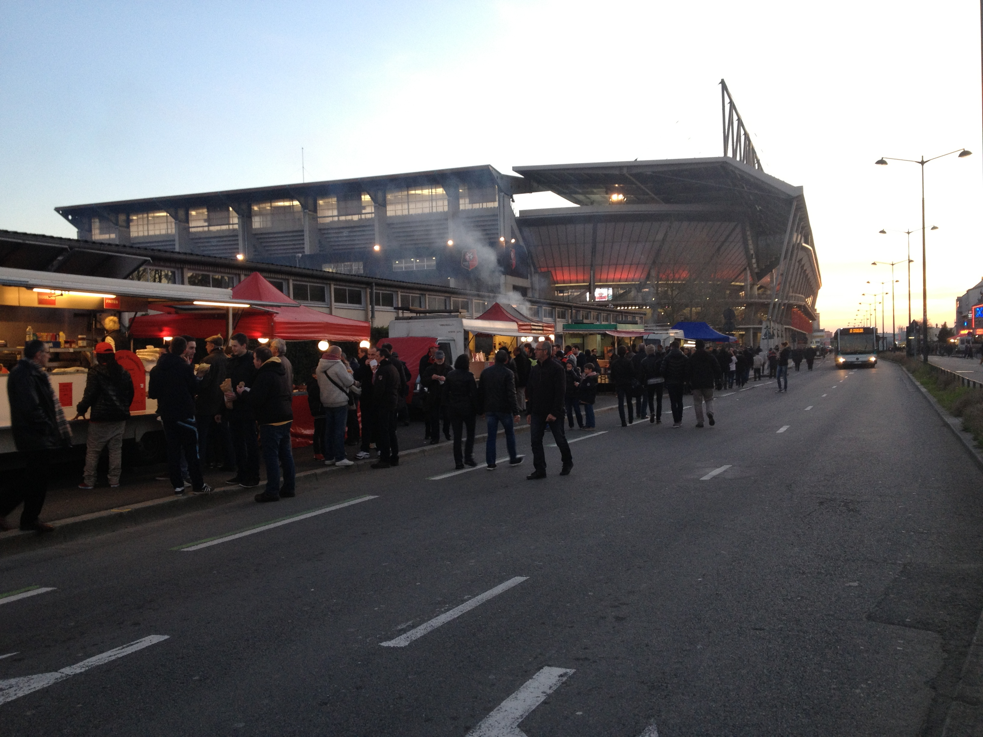 Alignement de stands vendant des galettes-saucisses le long de la route de Lorient avant un match de football du Stade rennais